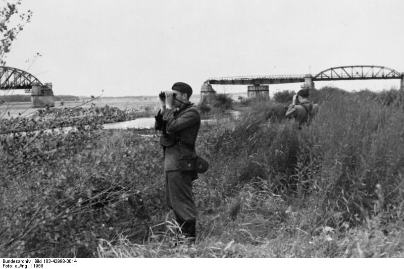 Grenzpolizei der DDR am Elbufer Zentralbild/Dt. Grenzpolizei 23.11.1956 10 Jahre Deutsche Grenzpolizei Am 1. Dezember 1956 begeht die Deutsche Grenzpolizei ihr 10jähriges Bestehen. Hart, schwer und gefährlich ist der Dienst unserer Grenzpolizisten. Aber freudig versehen sie Tag und Nacht, bei jeder Witterung ihren Dienst an den Grenzen der Deutschen Demokratischen Republik. Schon mancher Agent und Saboteur der den friedlichen Aufbau in unserer DDR stören wollte, konnte durch die Aufmerksamkeit der Genossen der Grenzpolizei dingfest gemacht und seiner gerechten Strafe zugeführt werden. Unser Dank gebührt deshalb an ihrem Ehrentag allen Angehörigen der Deutschen Grenzpolizei für ihren aufopferungsvollen Dienst zum Schutz unserer DDR. UBz.: Eine Streife der Deutschen Grenzpolizei bei der Kontrolle des Elbufers.